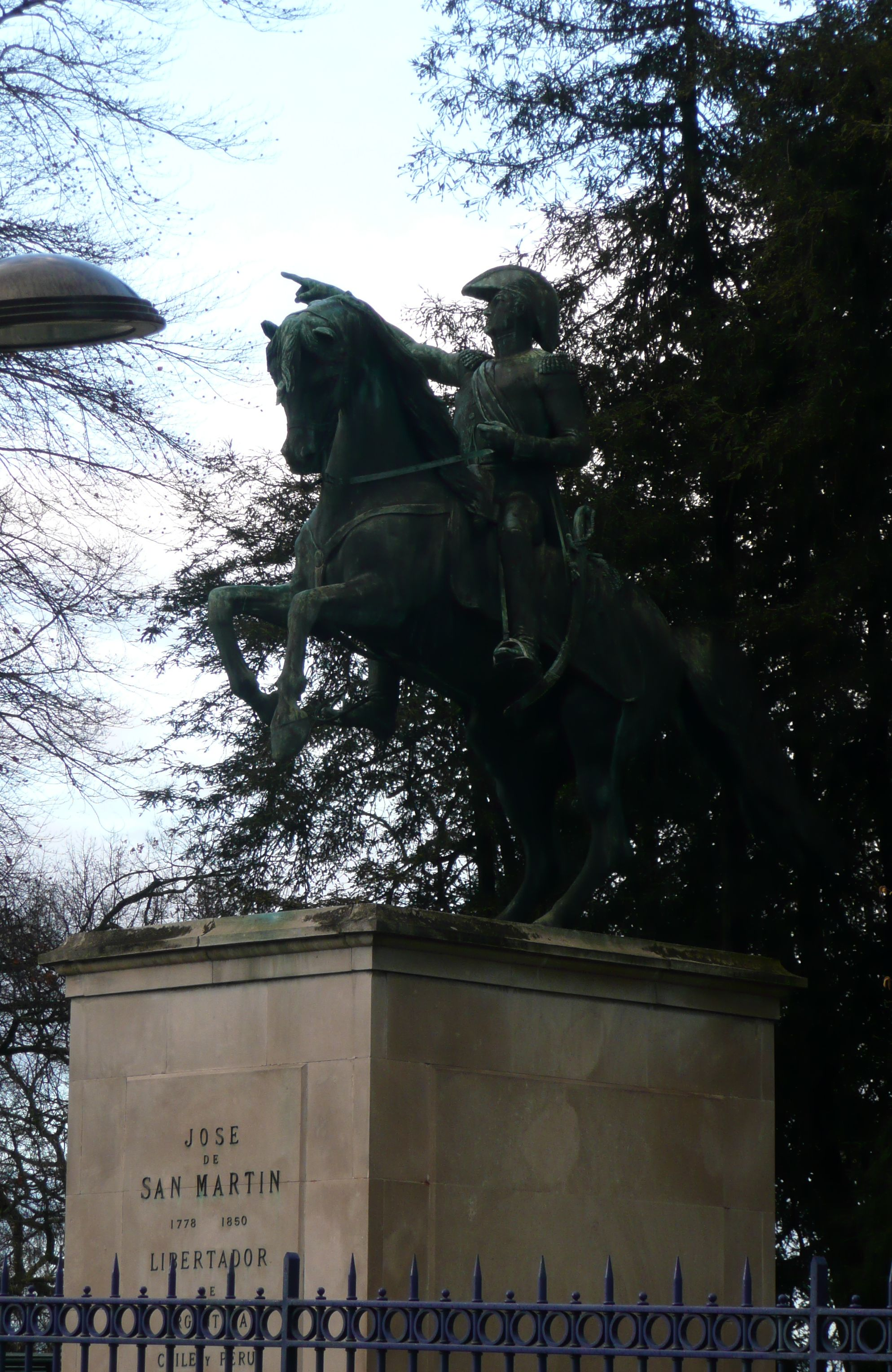 Reiterstandbild des José de San Martin (1778-1850), argentinischer General; Bronzekopie (1960) des im Jahr 1859 in Santiago de Chile errichteten Werkes von Louis-Joseph Daumas. Paris, 14. Arrondissement, Parc Montsouris